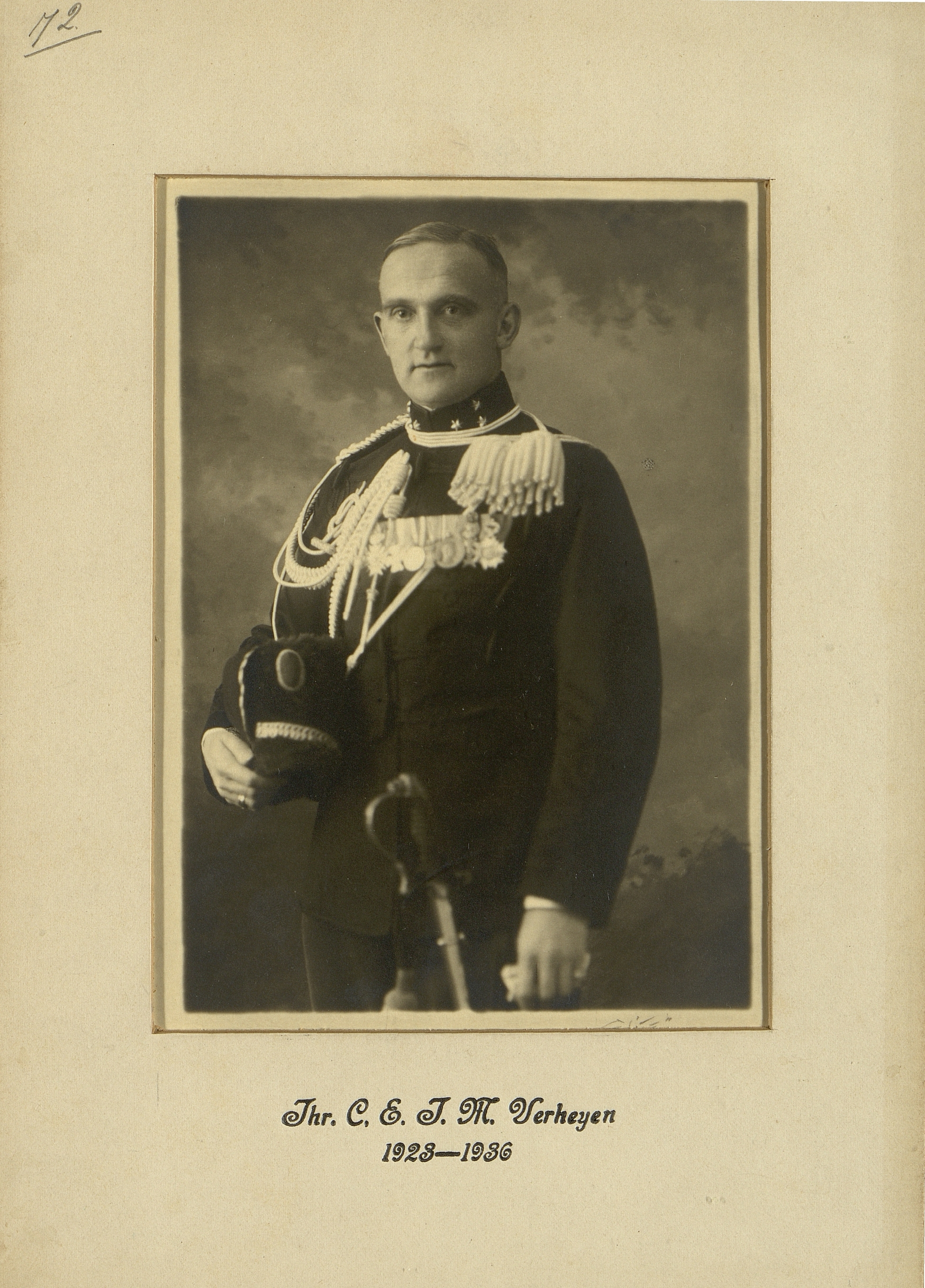 Portret